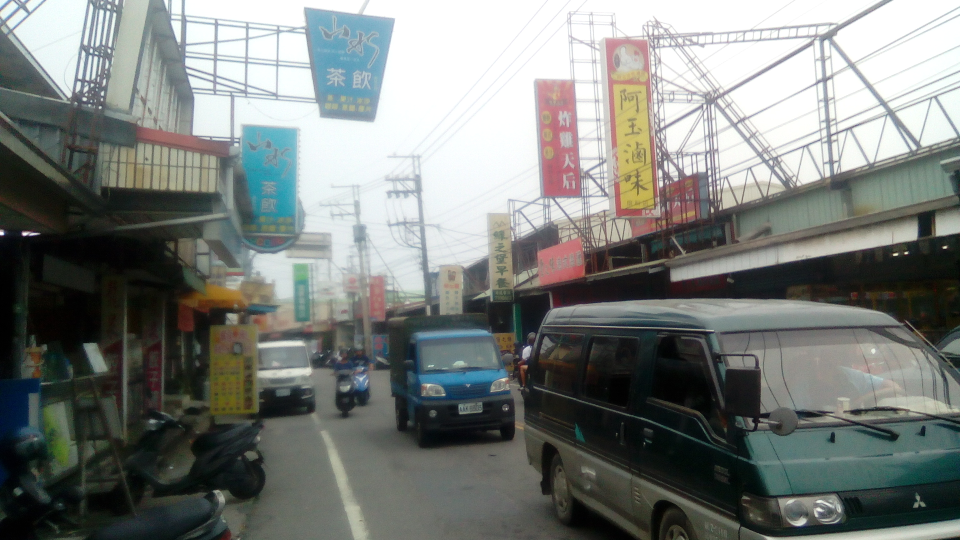 位於187縣道上，老埤和中林兩村交界，屏科大校門口。